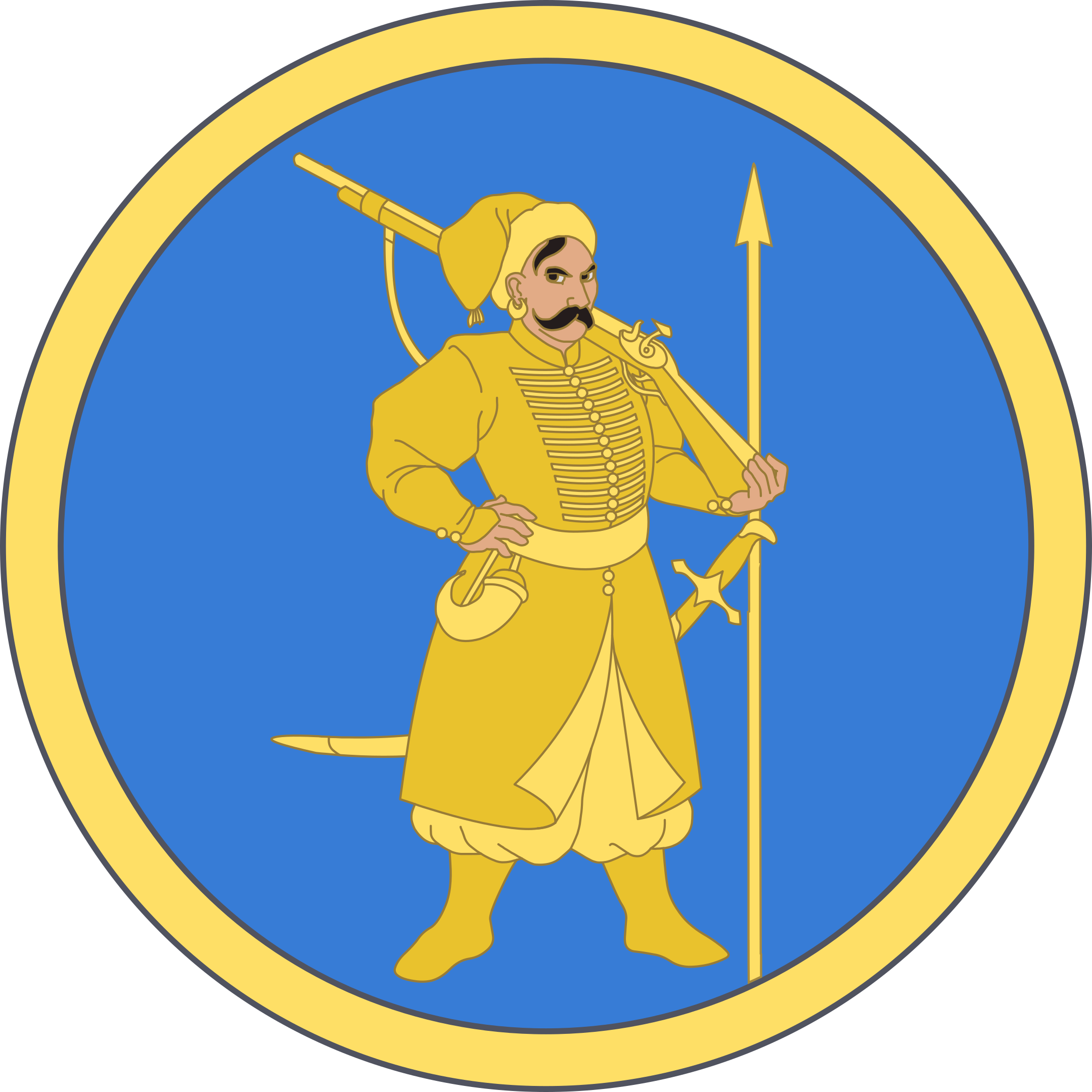 Основний мотив печаток Війська Запорожського низового